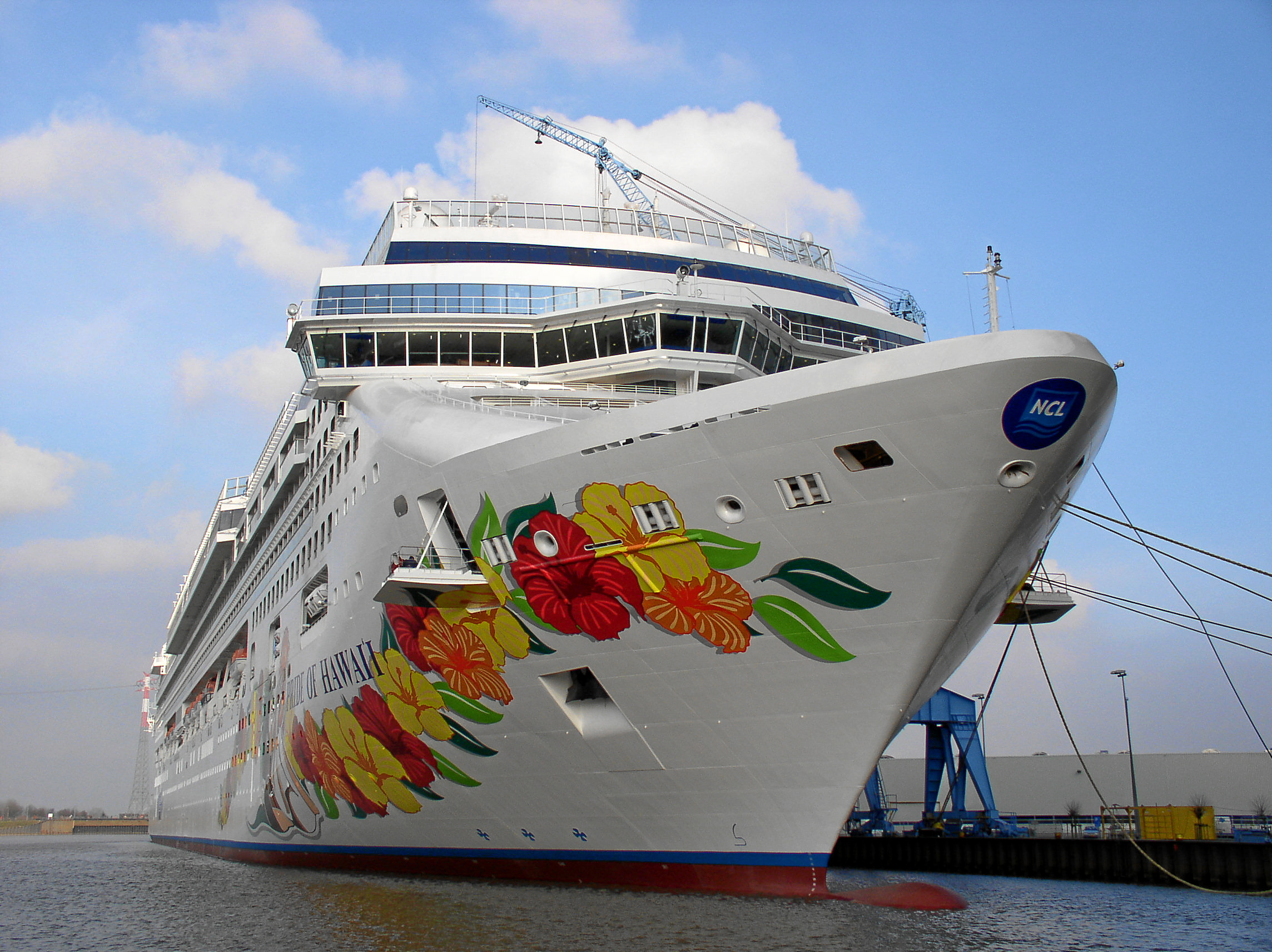 Die Pride of Hawaii am Tag der Ausdockung vor der Meyerwerft in Papenburg Quelle: selbst fotografiert am 19. Feb. 2006 Fotograf: H.H. Schoe